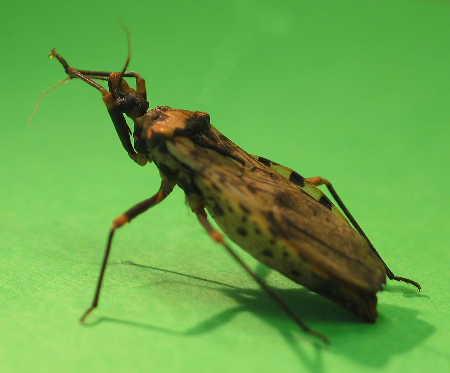 specie: Panstrogylus geniculatus autor: Fernando Otálora-Luna localidad: Montebello, Amalfi Municipality, Departmento de Antioquia, Colombia (6°55’58’’N; 75°05’30’’ W, 18-24 °C).